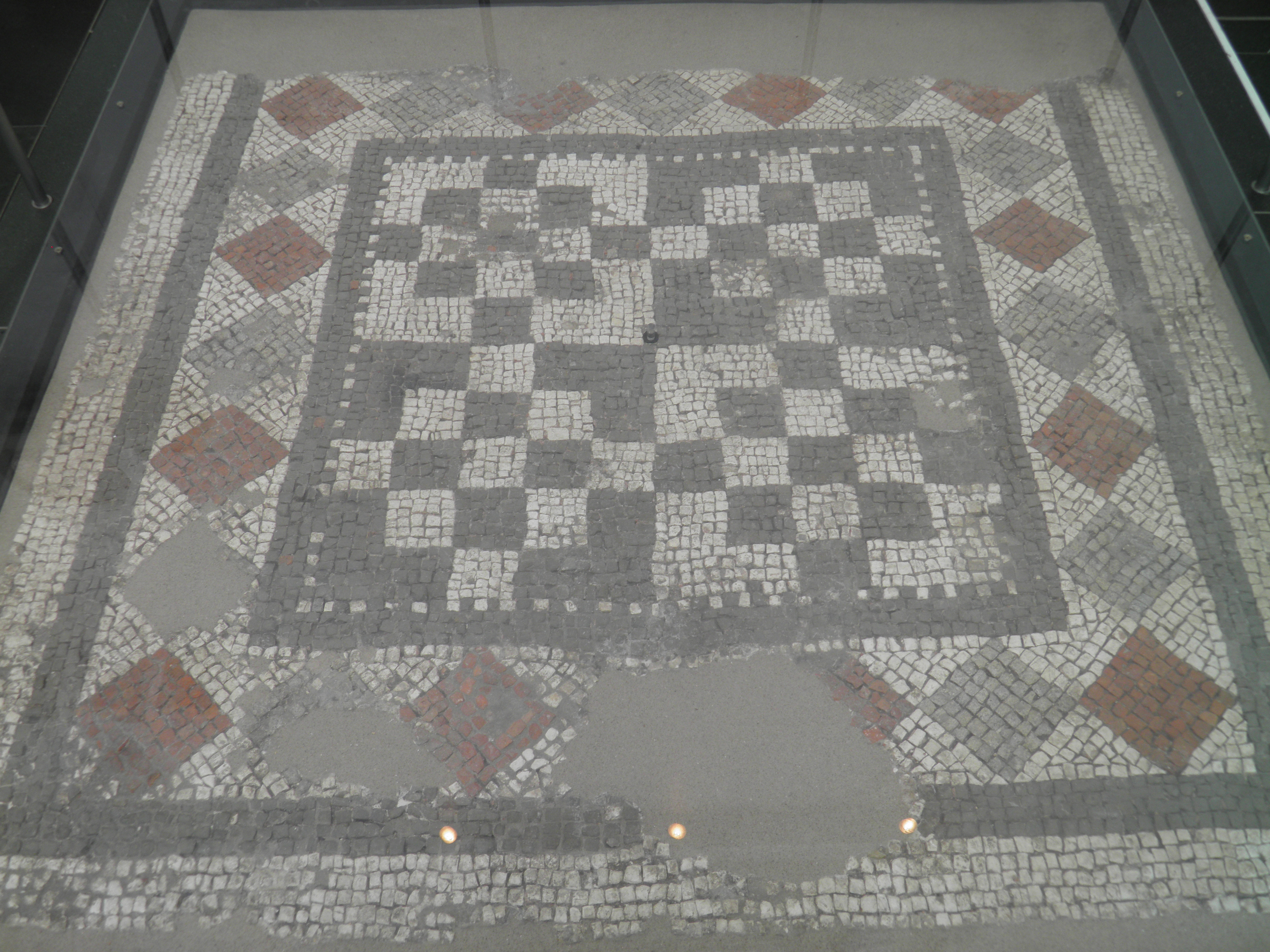 Reading Museum